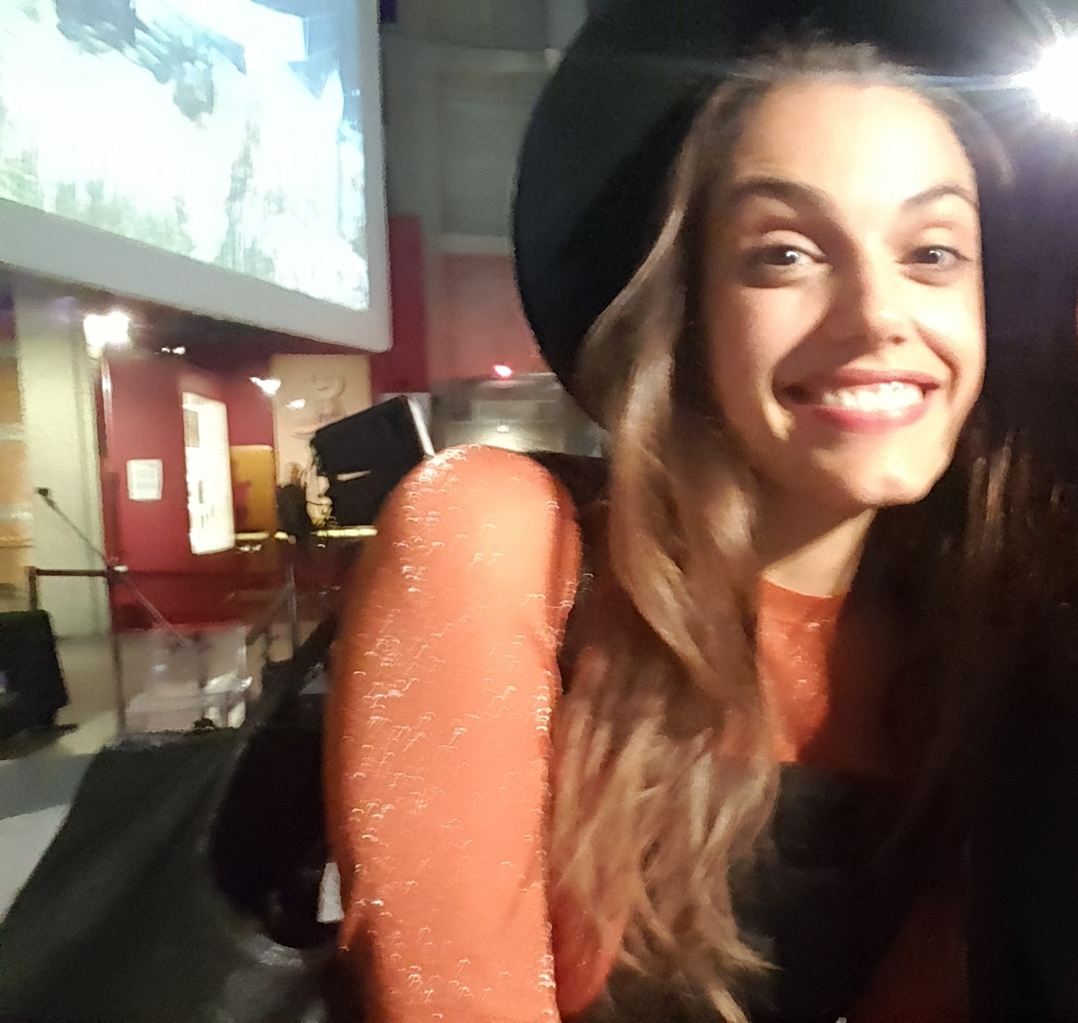 Concerto "Musica per tutti i sensi" con traduzione LIS - Mole Antonelliana